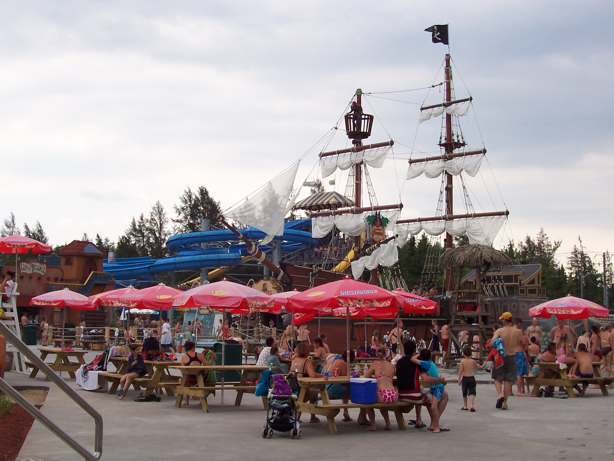 Village Vacances Valcartier, Quebec, Canada - Le repaire des Pirates /